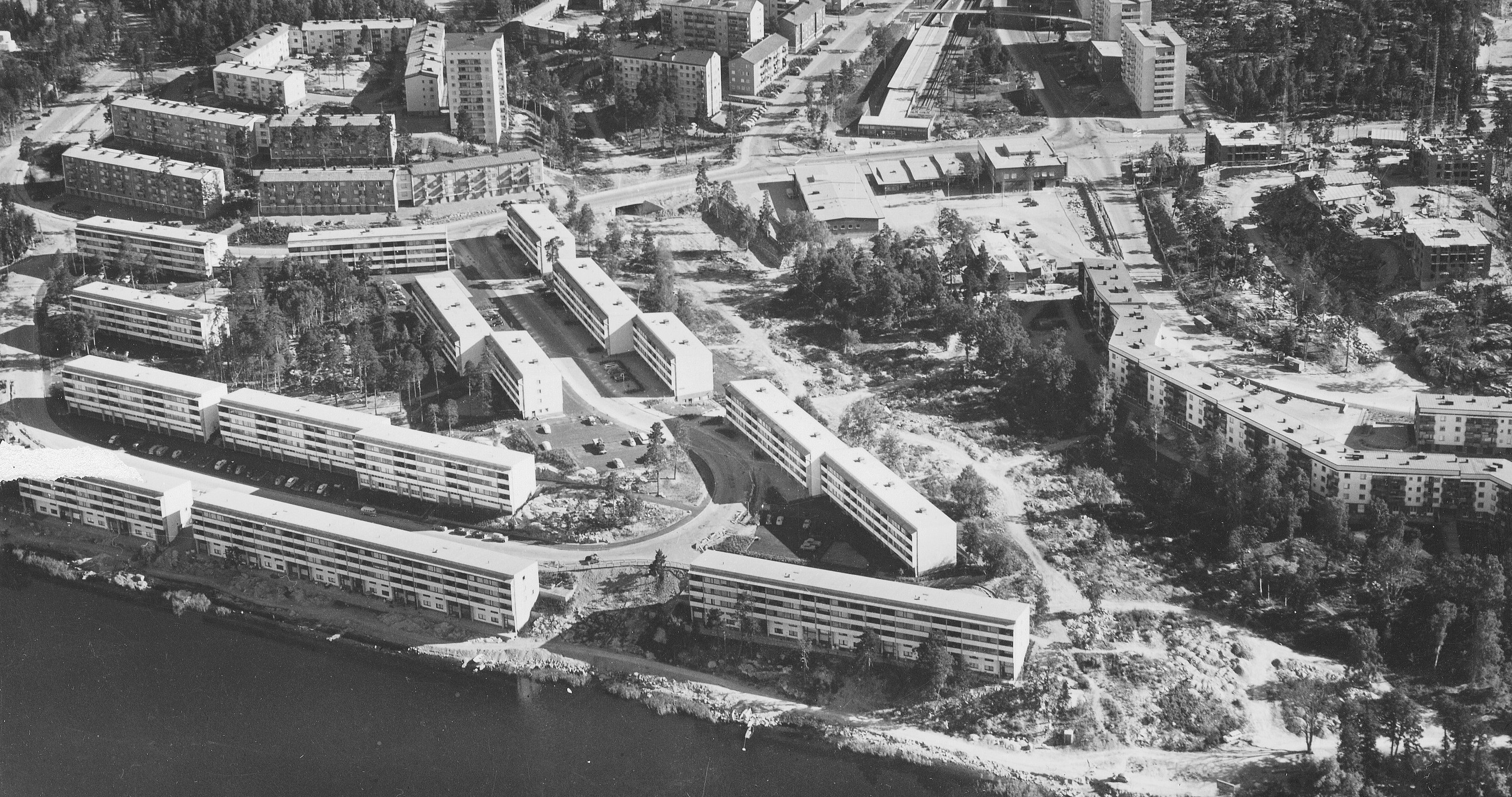 Hässelby strand med bostadsområdet Strandliden i förgrunden